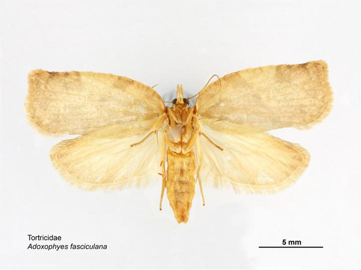 Adoxophyes fasciculana ventral view